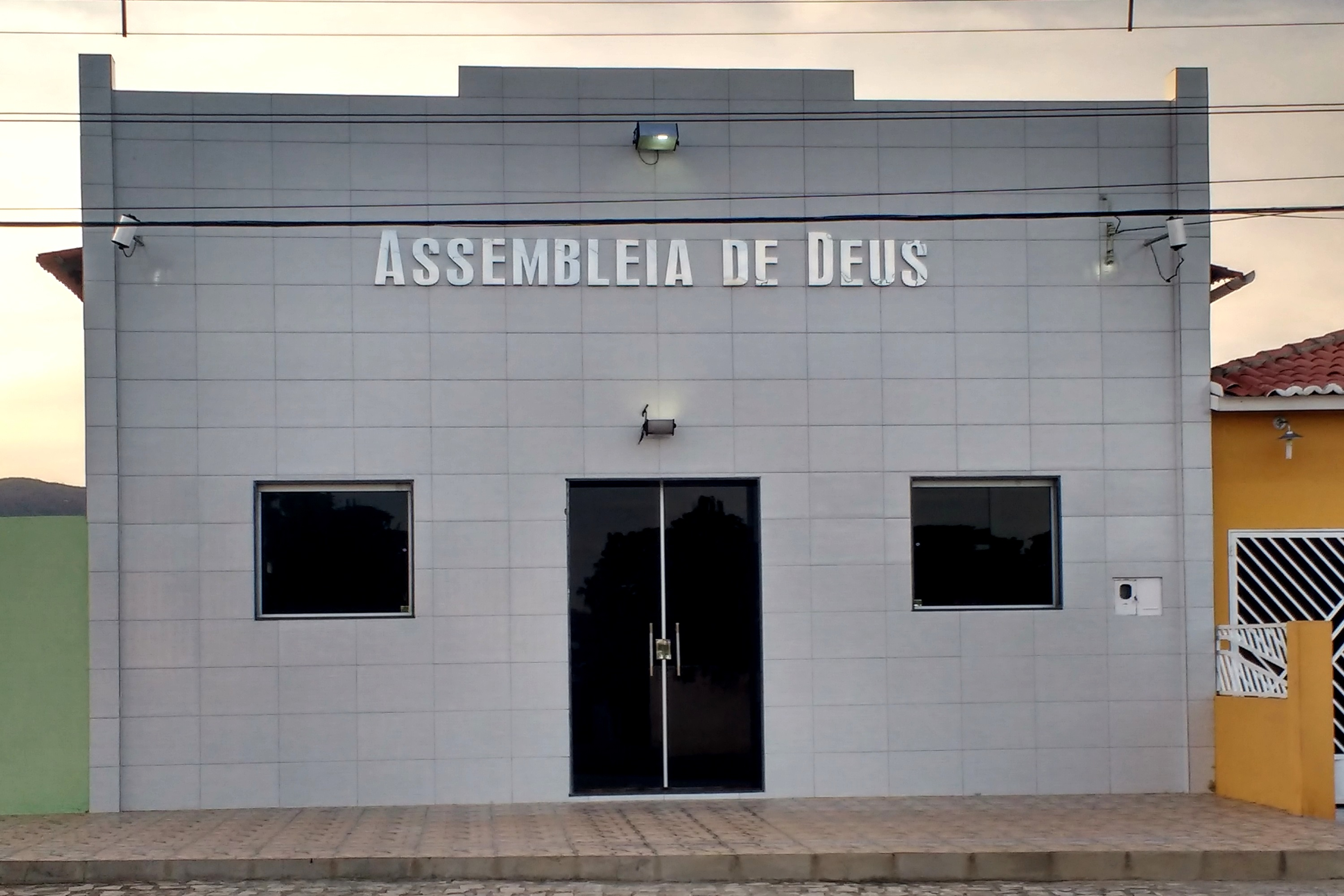 Tempo da Assembleia de Deus em José da Penha - Rio Grande do Norte, Brasil.